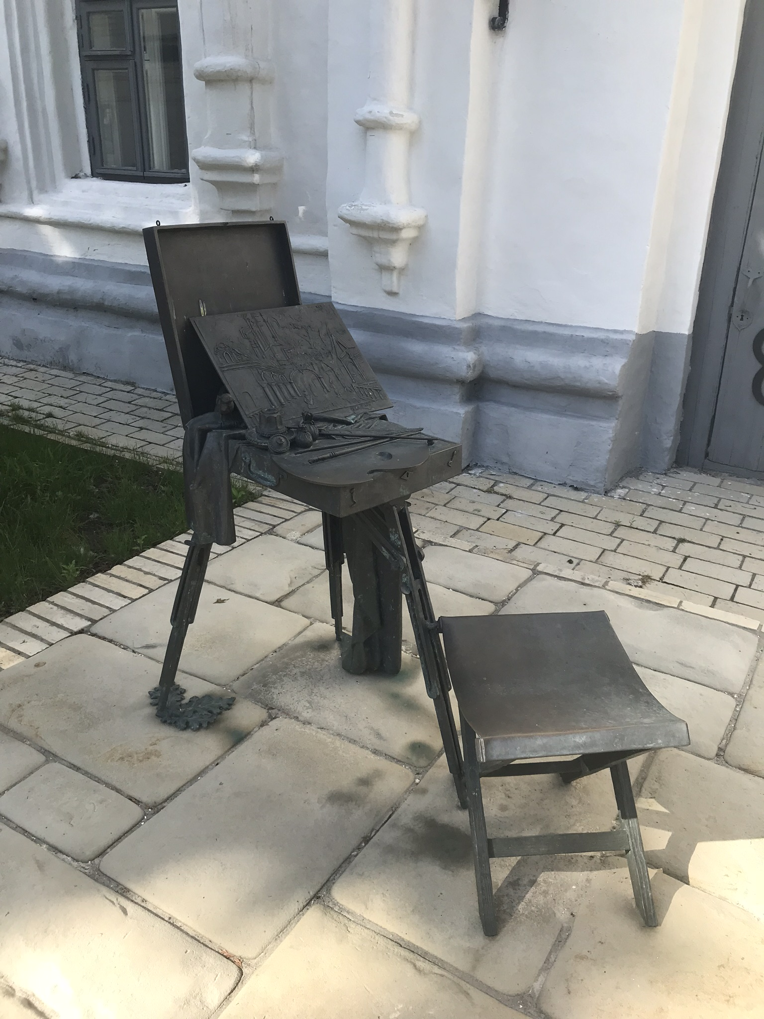 Памятный знак Тарасу Шевченко в Киево-Печерской лавре